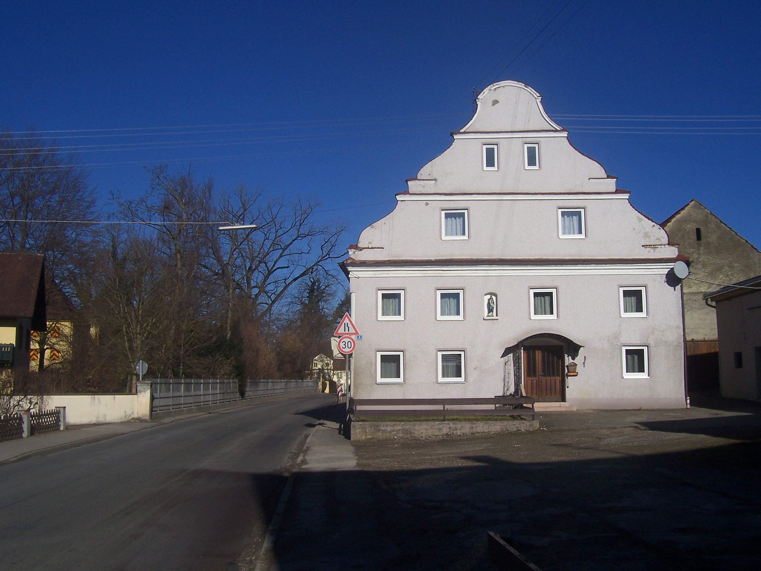 Barockes Bauernhaus in Obenhausen, Graf_moy-Straße 6